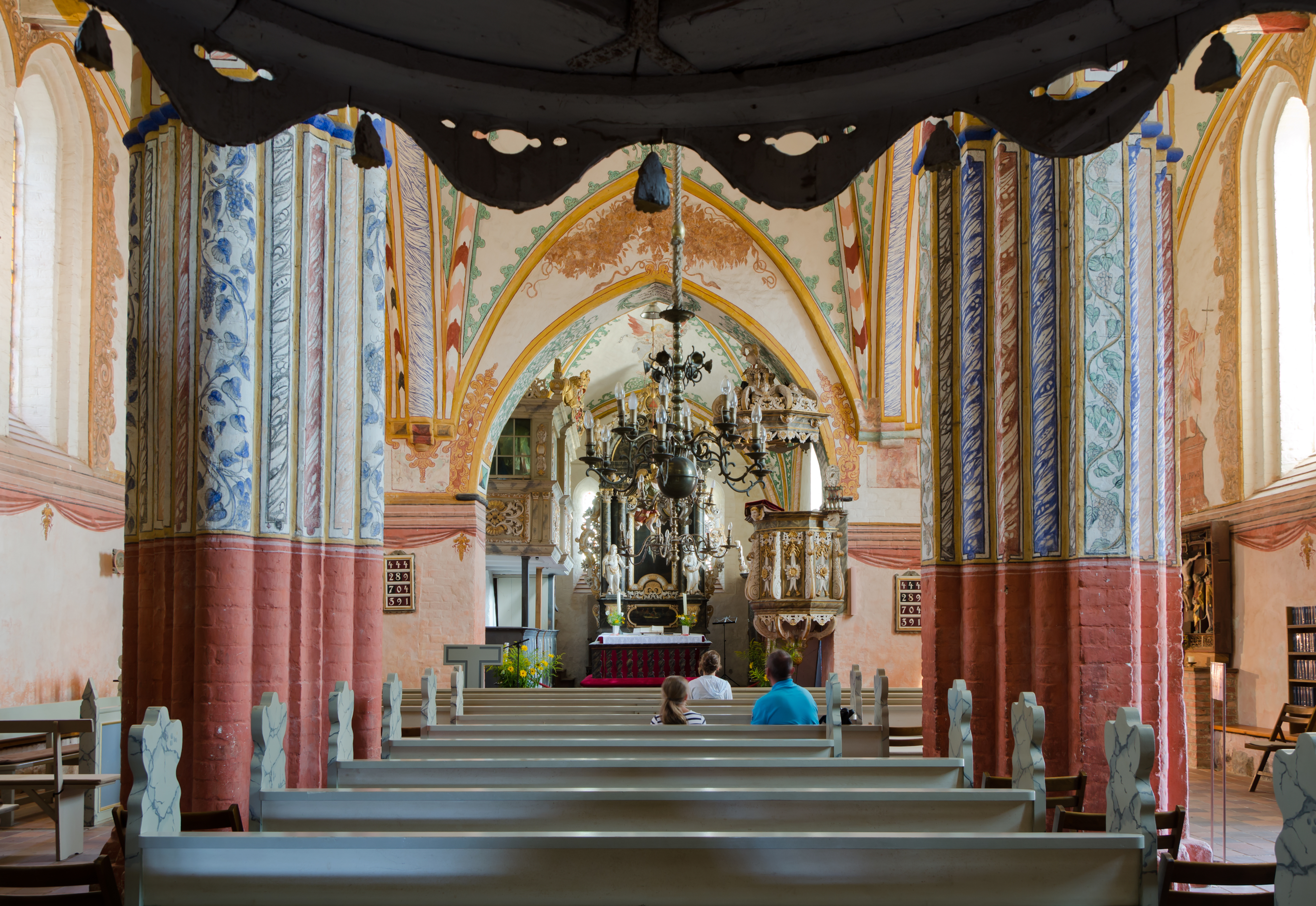 Rerik Kirche Blick Richtung Altar